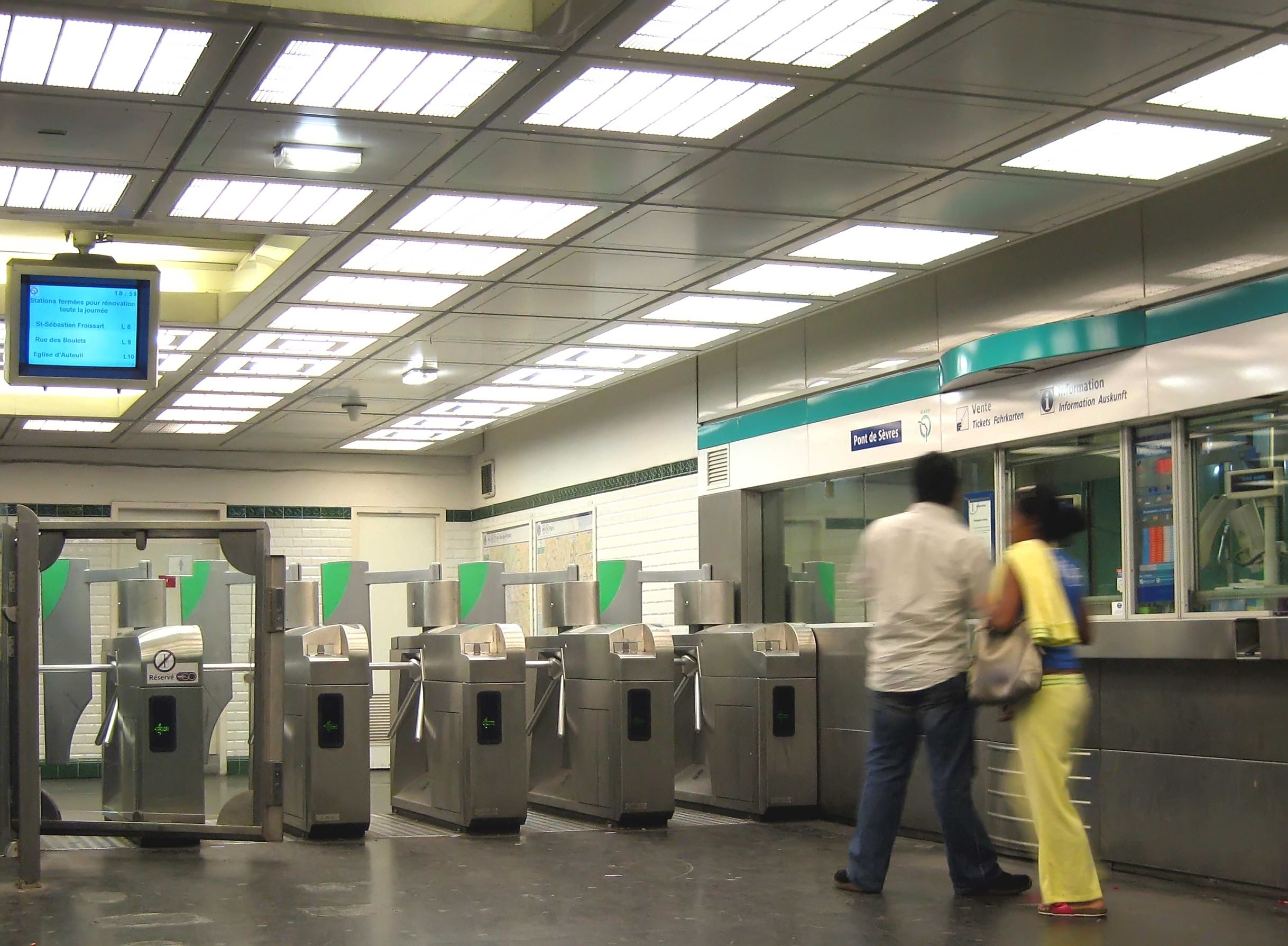 Description : Guichet et portillon d'accès à la station Pont de Sèvres à Boulogne Billancourt sur la ligne 9 Place : Paris, France Date : 2006 Author : Pline Schéma ou photo personnelle